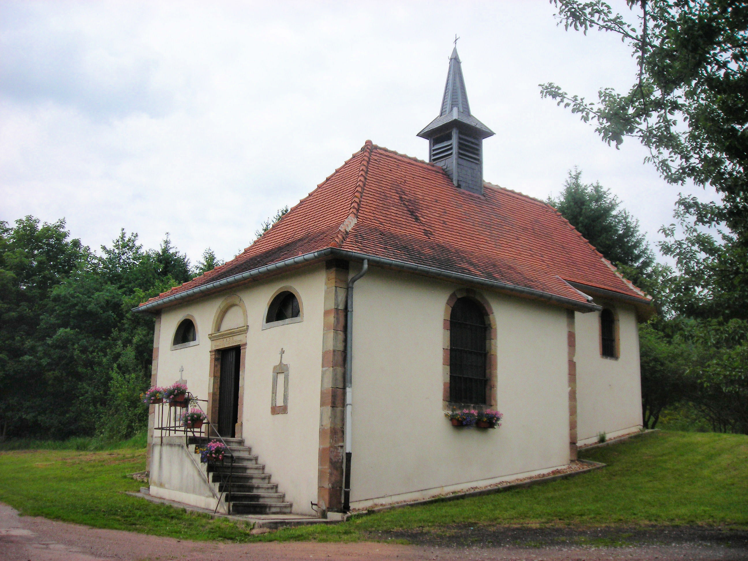 Chapelle de Varsberg (Lorraine, France)